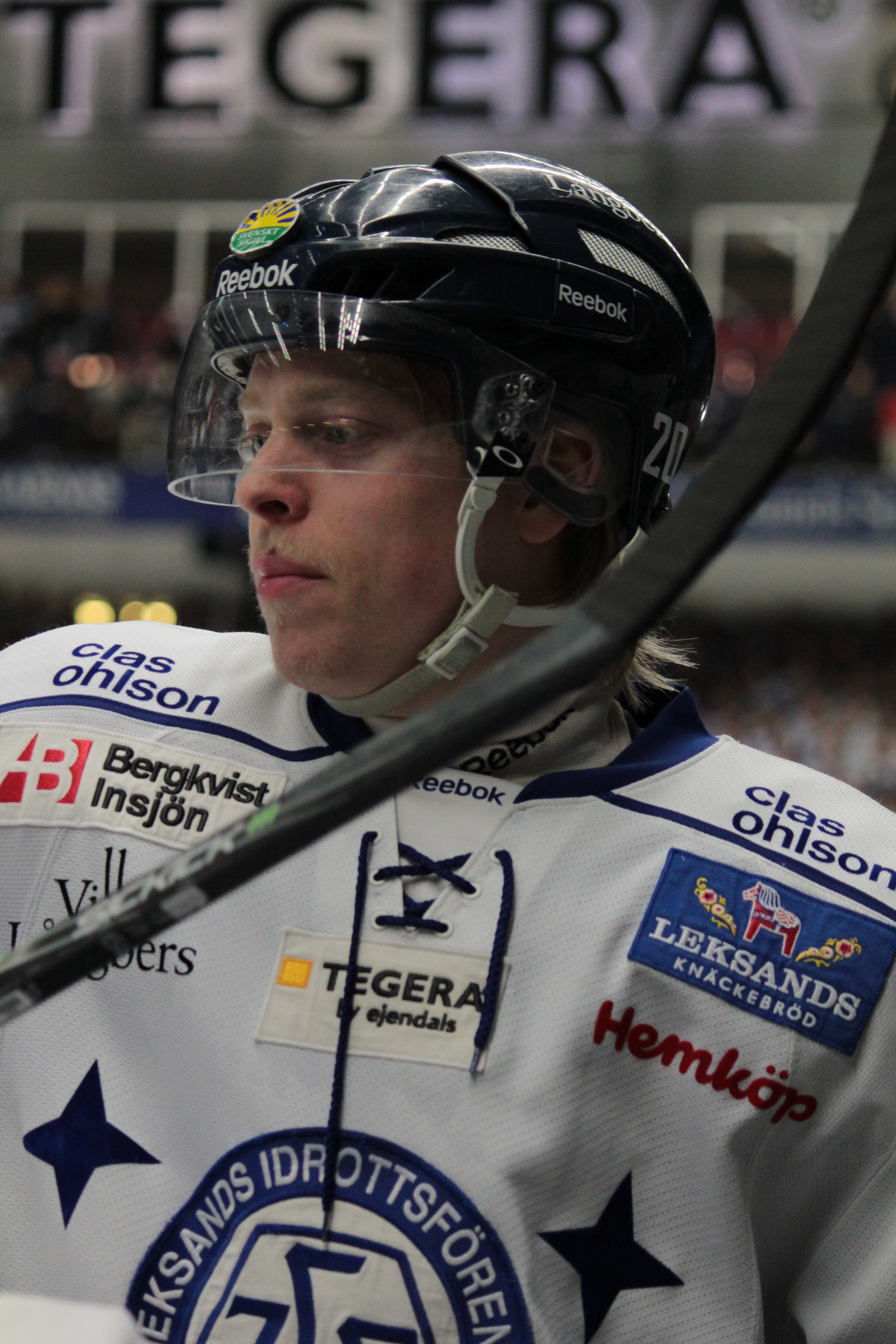 Ken André Olimb i kvalmatchen mellan Leksands IF och Djurgårdens IF i Leksand 2012-03-31.